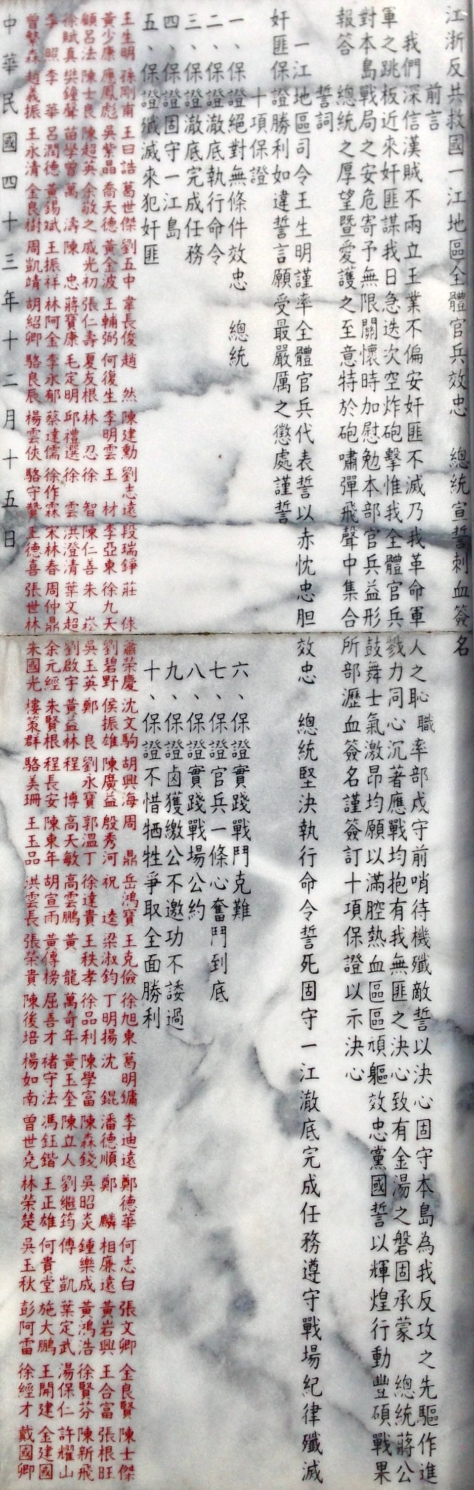 新北市中和區一江新城一江山殉難烈士紀念碑文